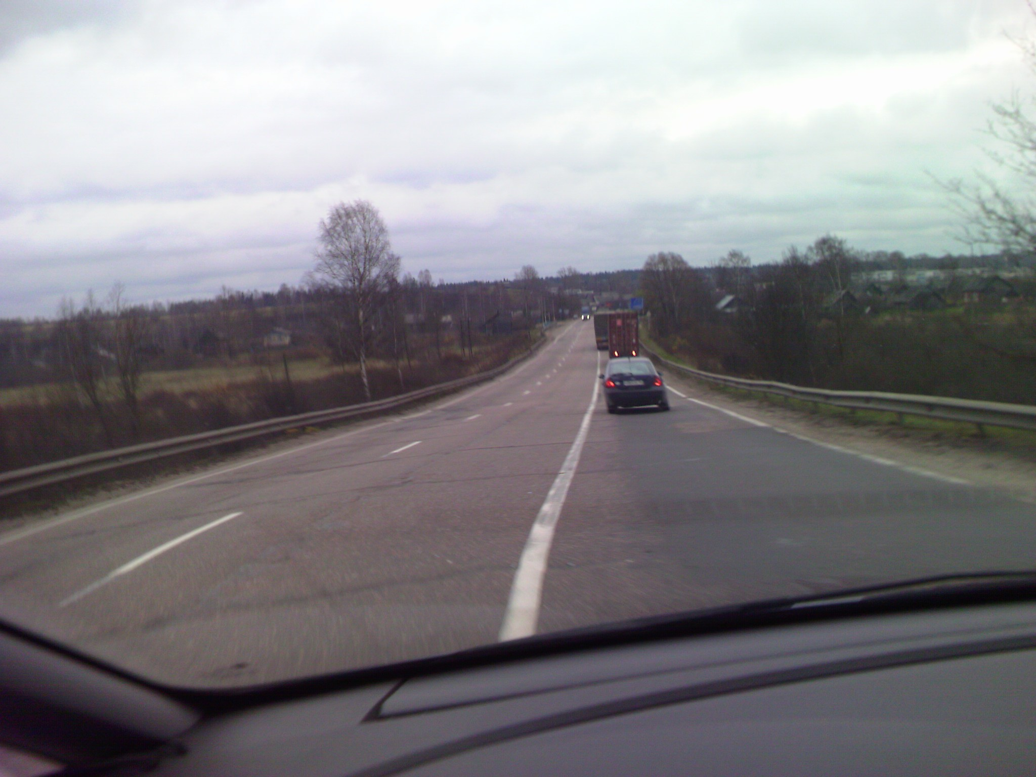 Kresttsy, Novgorod Oblast, Russia